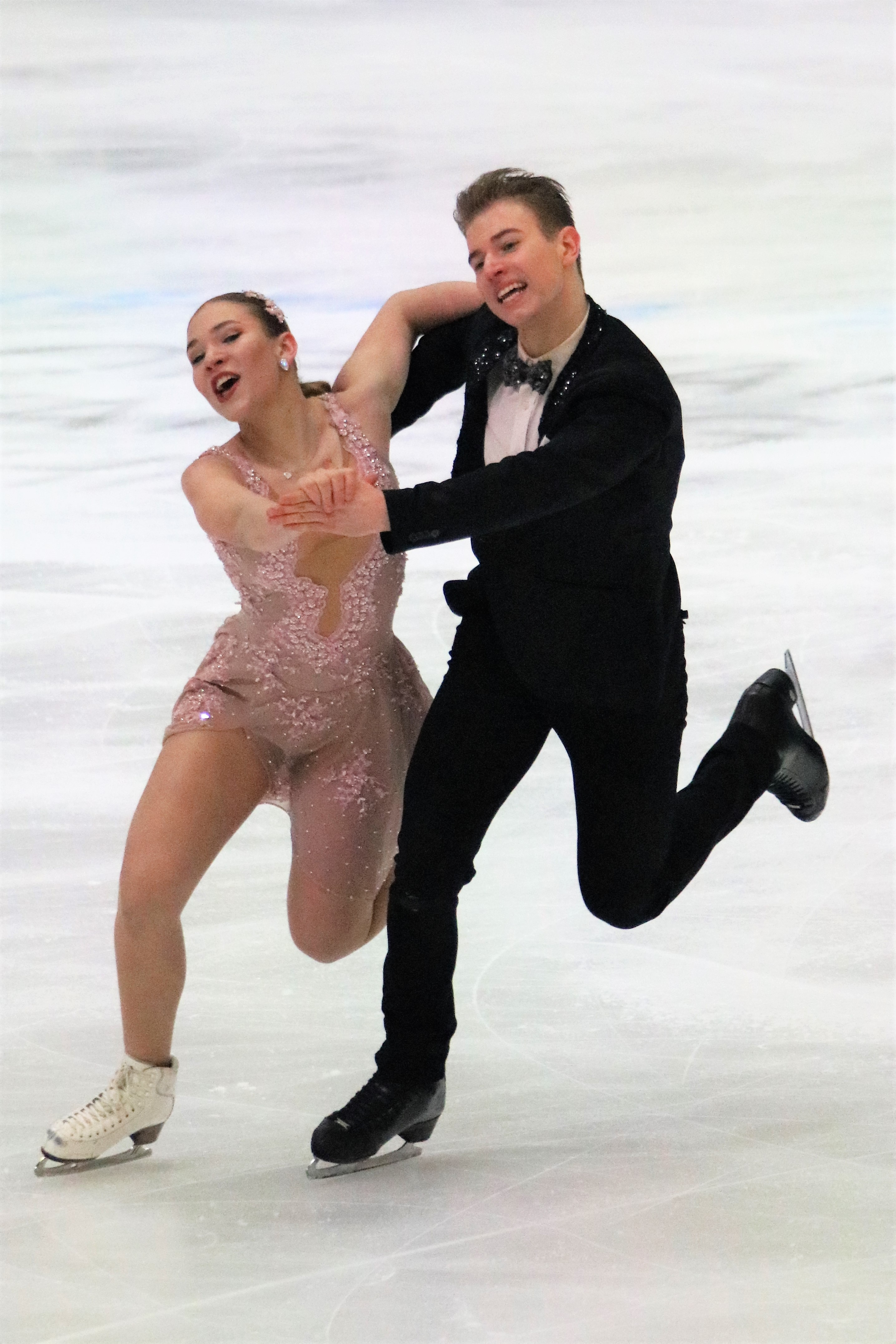 Натали Ташлерова и Филип Ташлер (Чешская Республика) на чемпионате Европы по фигурному катанию 2020